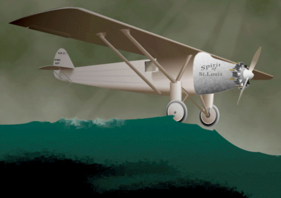 Traversée de l'Atlantique par Charles Lindbergh à bord de Spirit of Saint Louis.